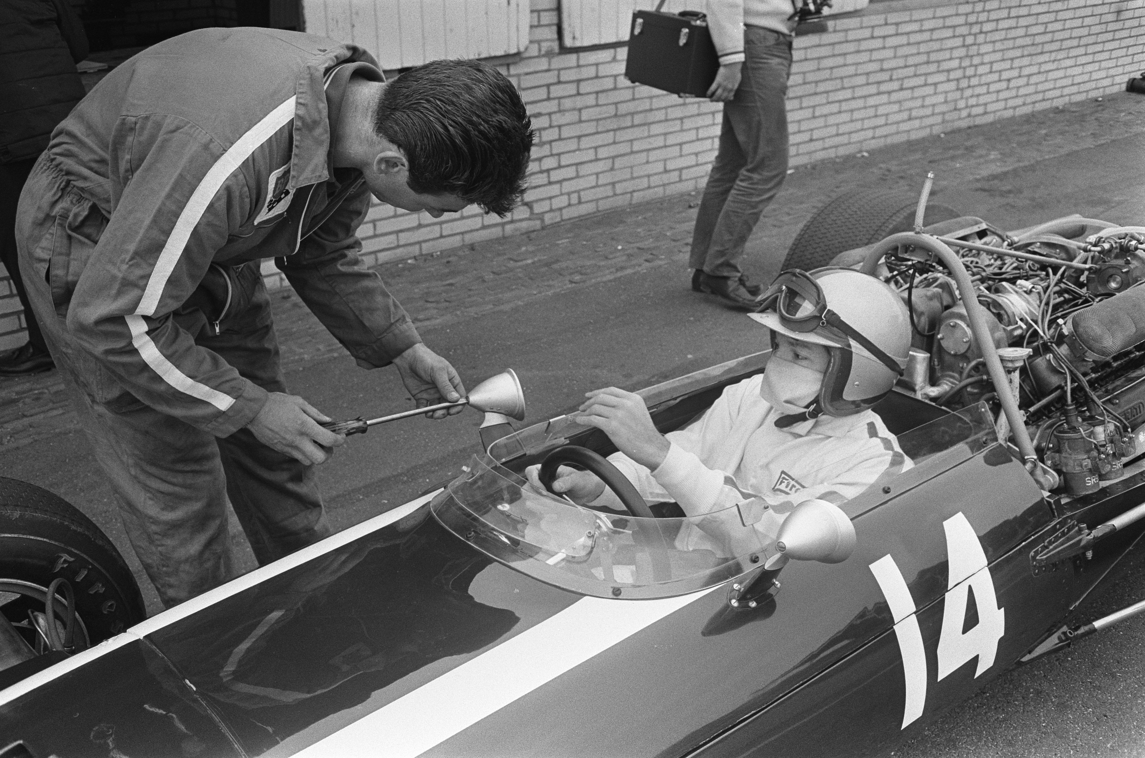 Collectie / Archief : Fotocollectie Anefo Reportage / Serie : [ onbekend ] Beschrijving : Training Grand Prix te Zandvoort Datum : 2 juni 1967 Locatie : Noord-Holland, Zandvoort Fotograaf : Koch, Eric / Anefo Auteursrechthebbende : Nationaal Archief Materiaalsoort : Negatief (zwart/wit) Nummer archiefinventaris : bekijk toegang 2.24.01.05 Bestanddeelnummer : 920-3739 Reacties Geplaatst door Luc Ghys op 29 augustus 2016 - 20:07. De Mexicaan Pedro Rodriguez in de Cooper-Maserati T81